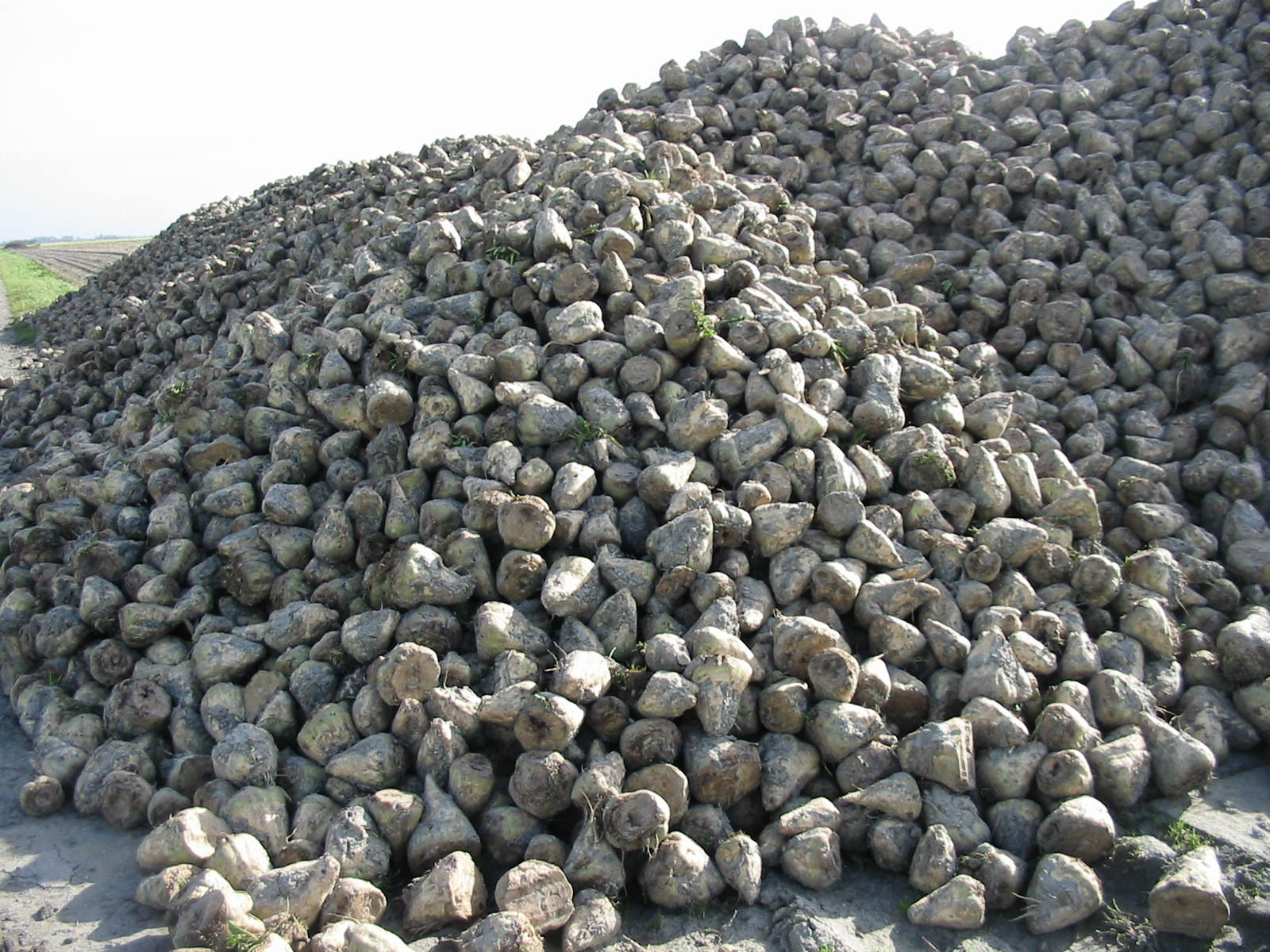 Berg suikerbieten bij Renesse Zeeland oktober 2004